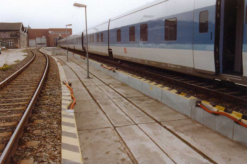 Autor: Ralf Roletschek GNU-FDL (selbst aufgenommen)